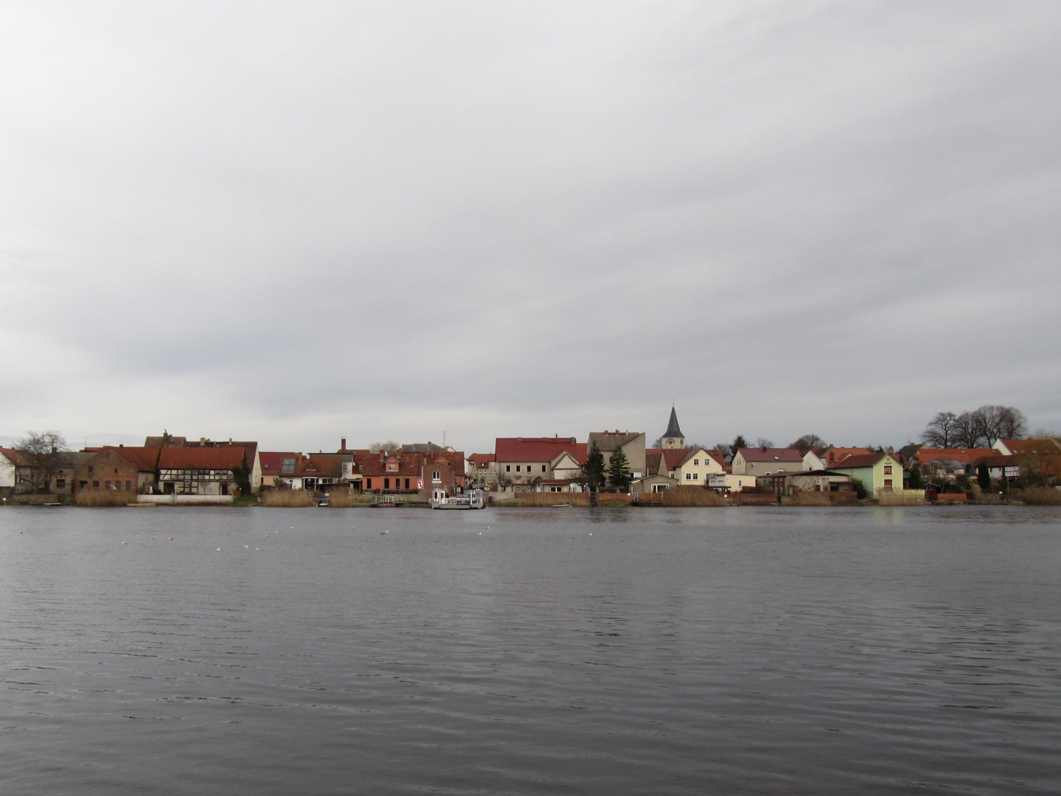 ansicht pritzerbes über die havel